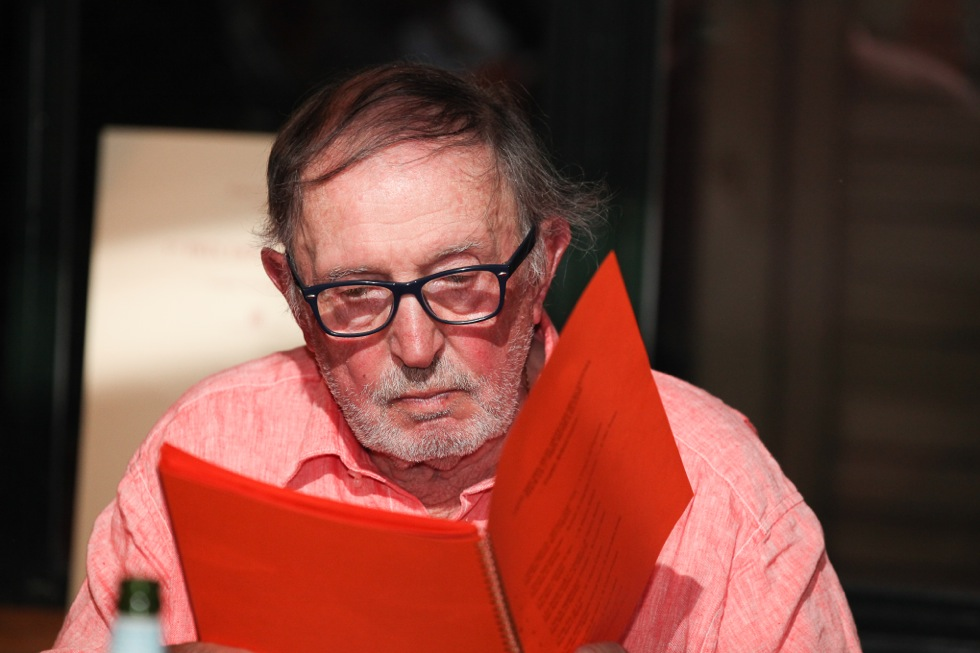 Denis Lalanne, né à Pau le 1er avril 1926, figure mythique du journalisme de sport.